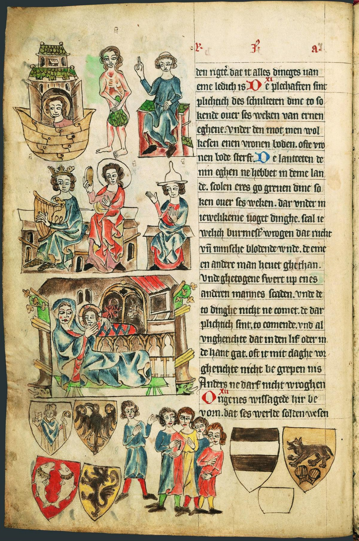 Seite aus der Oldenburger Bilderhandschrift des Sachsenspiegels, Landrecht und Lehnrecht. Nach dem Oldenburger Codex picturatus von 1336. Hrsg. A. Lübben 1879, Landrecht, erstes Buch, Seite [16] 7v. – Links und rechts unten, die sieben Wappen der Heerschildordnung: Reichsadlerwappen für den König, Bischofswappen für die geistlichen Fürsten, Löwenwappen (Markgraf von Meißen) für die weltlichen Fürsten, als Vertreter des vierten Heerschildes das Forellenwappen der Grafen von Wernigerode, des fünften, das Wolfswappen der Herren von Berwinkel, des sechsten, das Balkenwappen der Herren von Hoym, (siebtes leer). State Library of Oldenburg